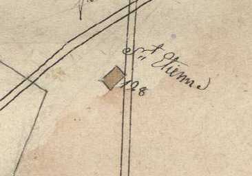 Campelles en el Cadastre napoleònic del 1812 (Arxius Departamentals dels Pirineus Orientals)